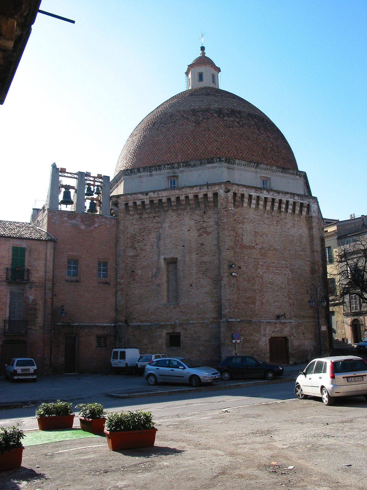 Giulianova, Abruzzo, Italia